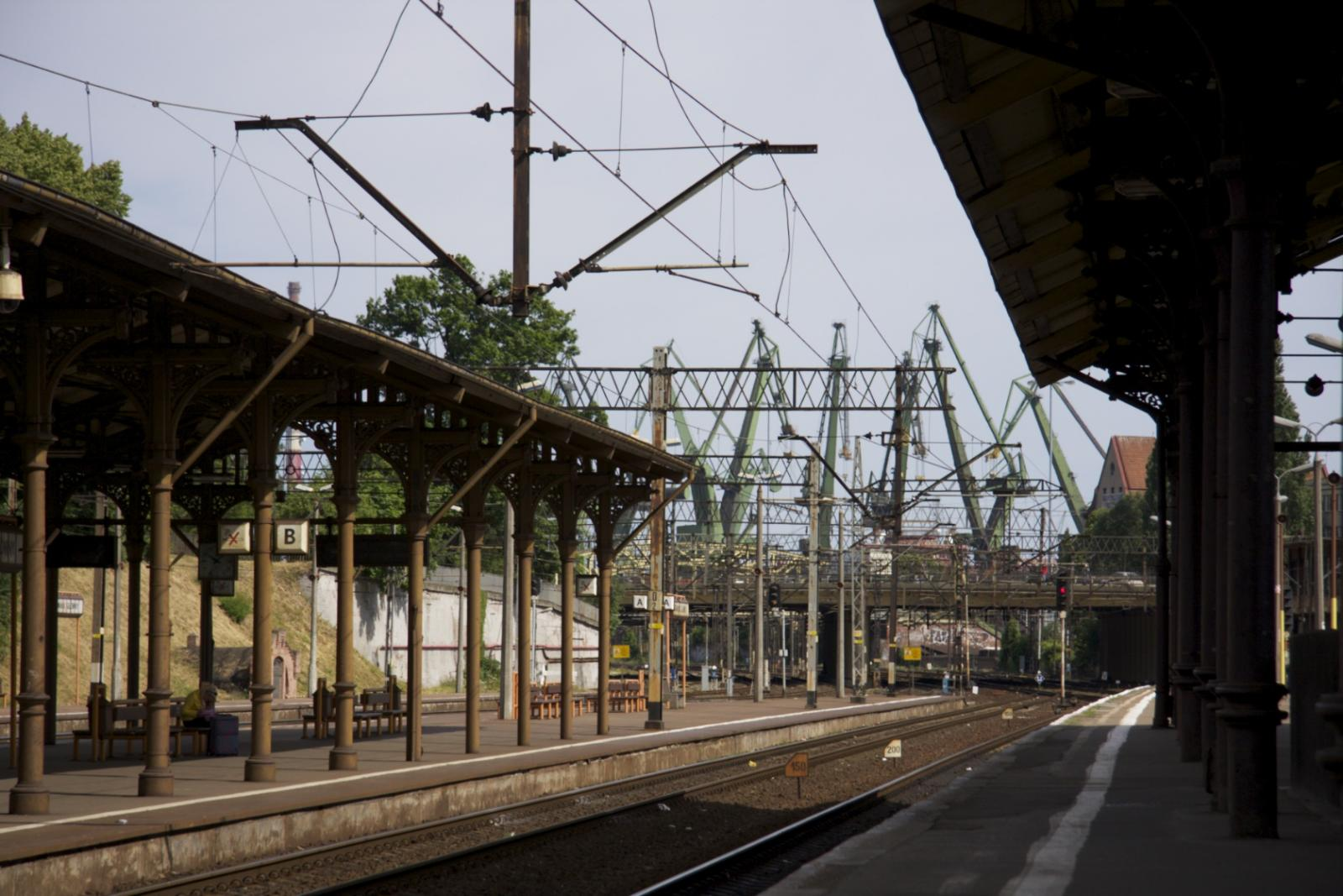 Gdańsk Główny